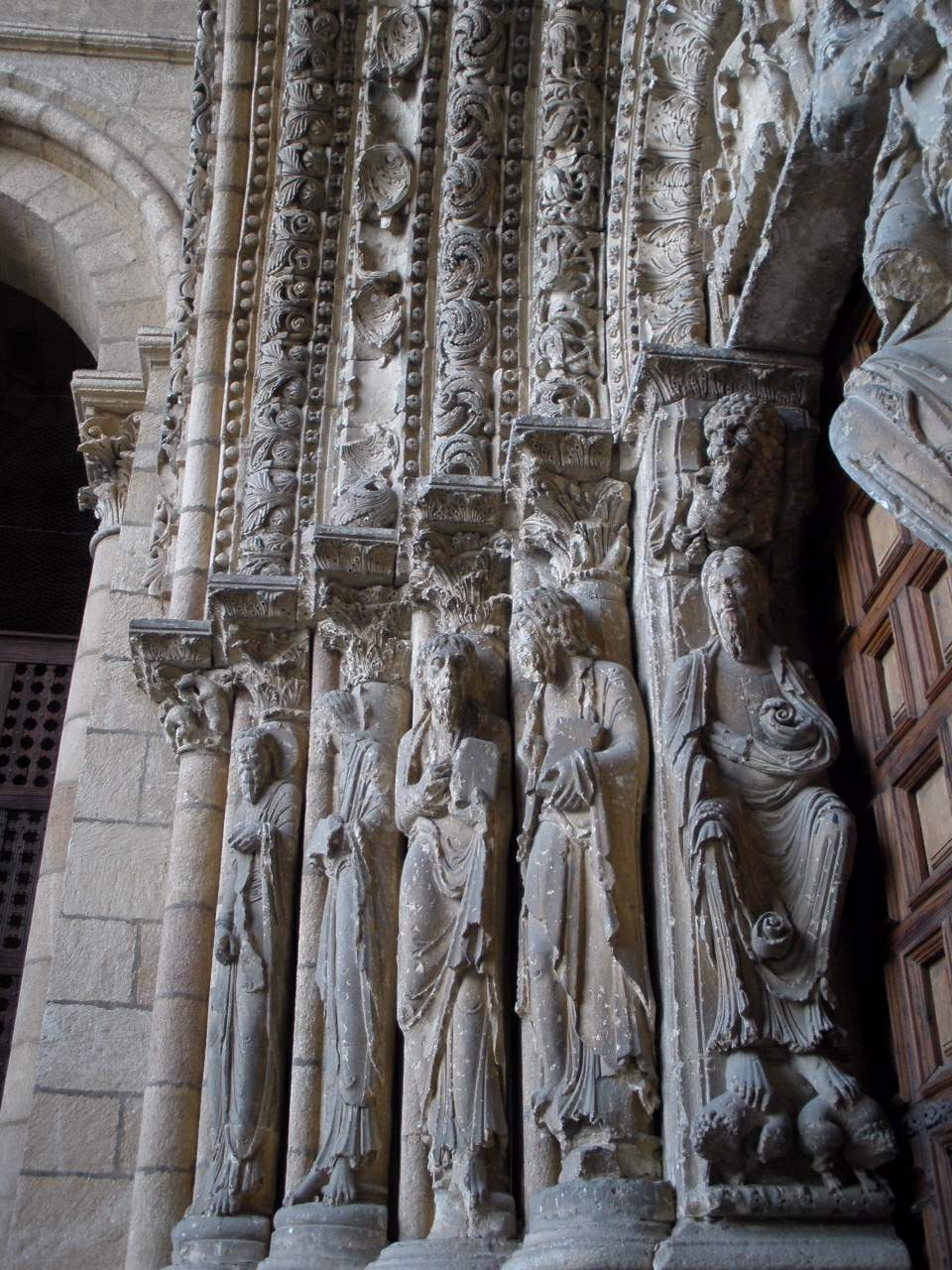 Portada occidental de la Basílica de San Vicente, Ávila